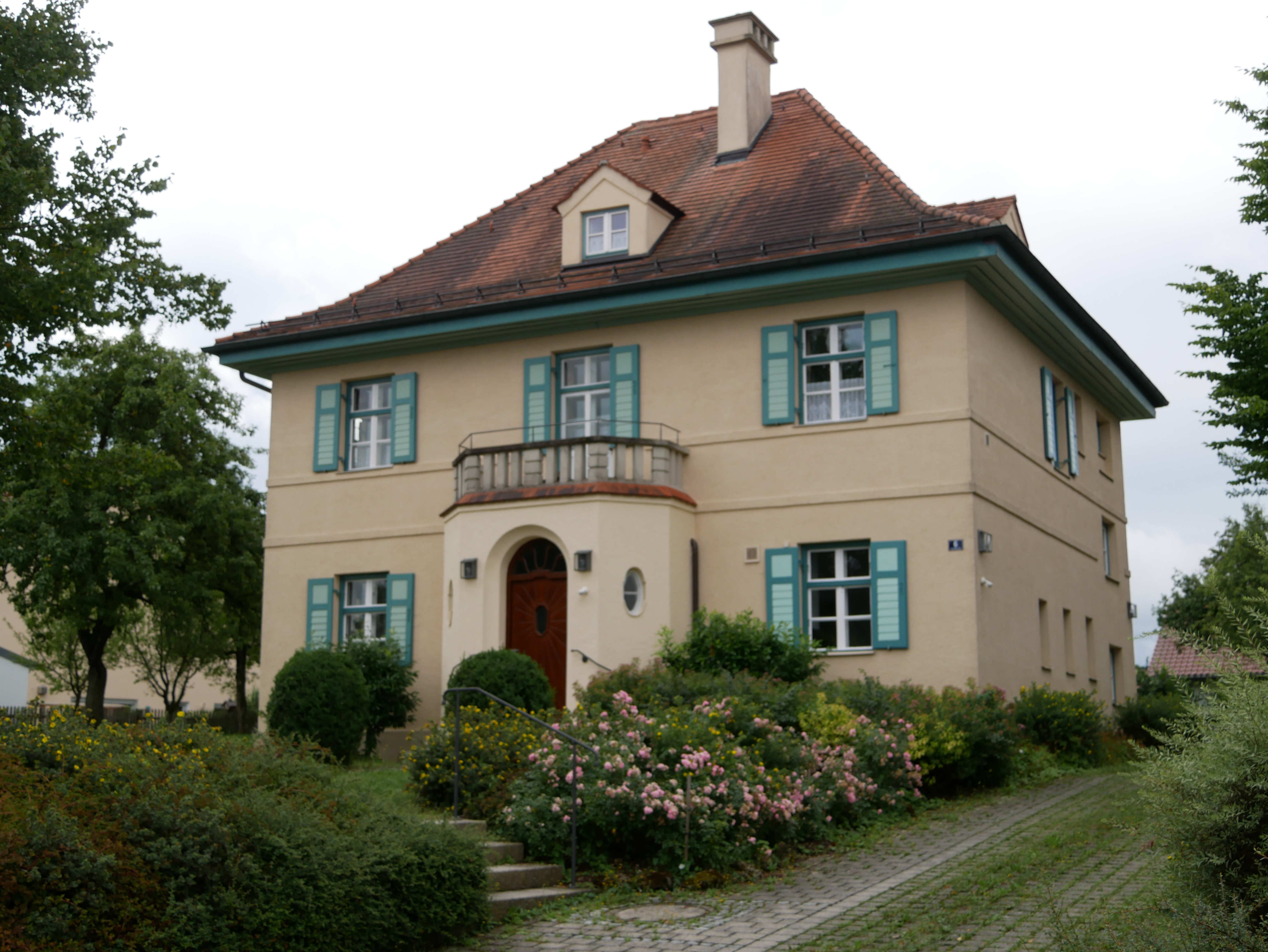 Fürstenfeldbruck, Ortsteil (OT) Aich, Brucker Str. 6: Ehemaliges Kuratenhaus, heute Pfarrhaus. Ansicht von NNW